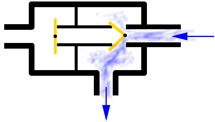 Halboffenes narkosesystem (Ambu) in Inspiration